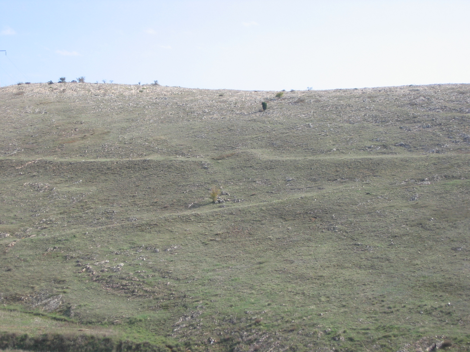 Campamento romano principal desde el Castro de La Loma. Santibáñez de la Peña (Palencia, Castilla y León). Vista de uno de los campamento legionarios de los 3 identificados durante el asedio que sufrió el castro de La Loma durante las guerras cántabras (del 29 al 19 A.C.). Detalle de puerta claviculae y parte de la circunvalación que lo rodeaba.